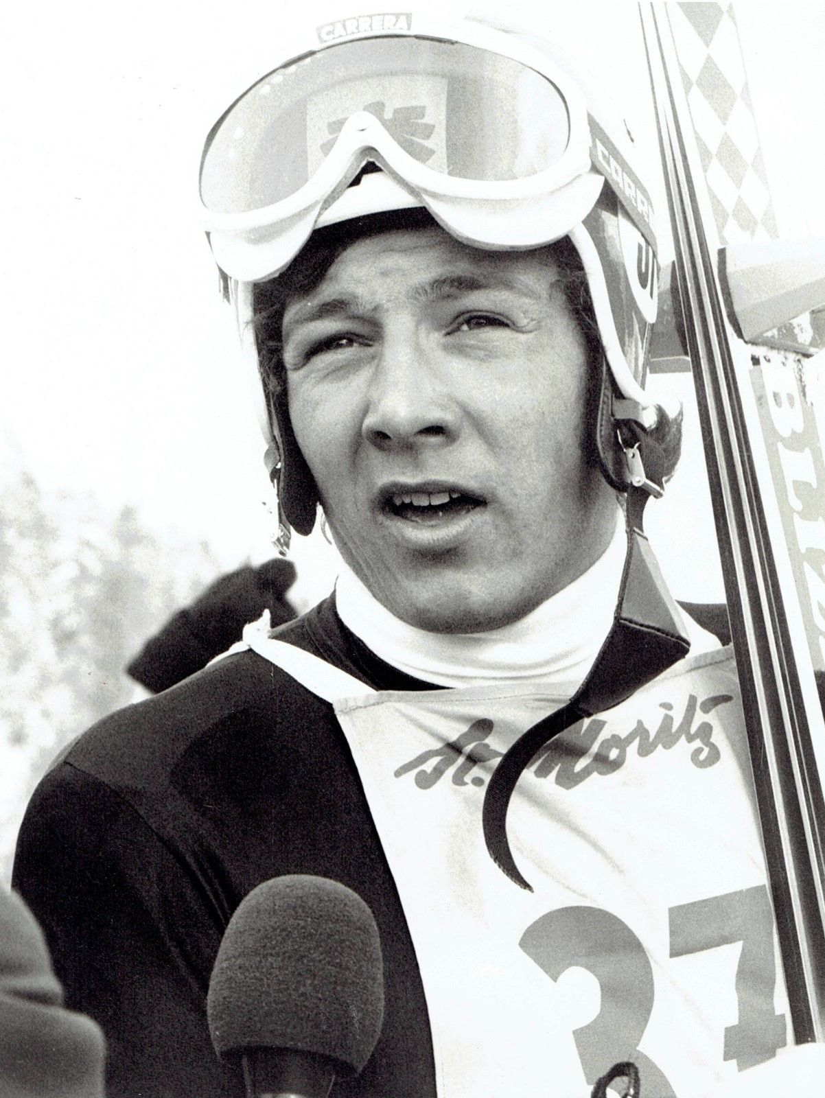 1973 Original Photo Austrian alpine skier Werner Grissmann wins St. Moritz race